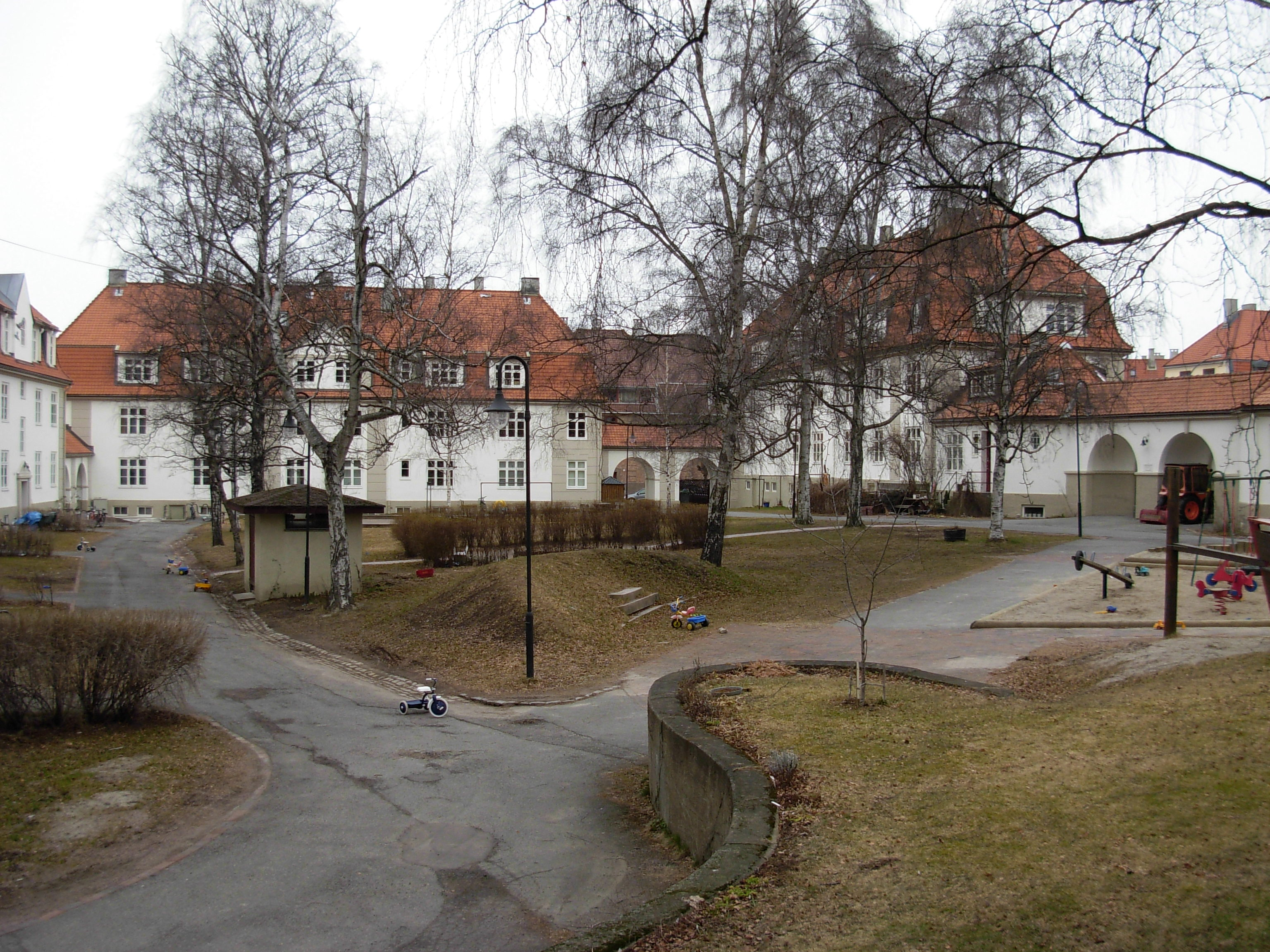 Gårdsrom i Lindern hageby, Oslo, bygget 1919